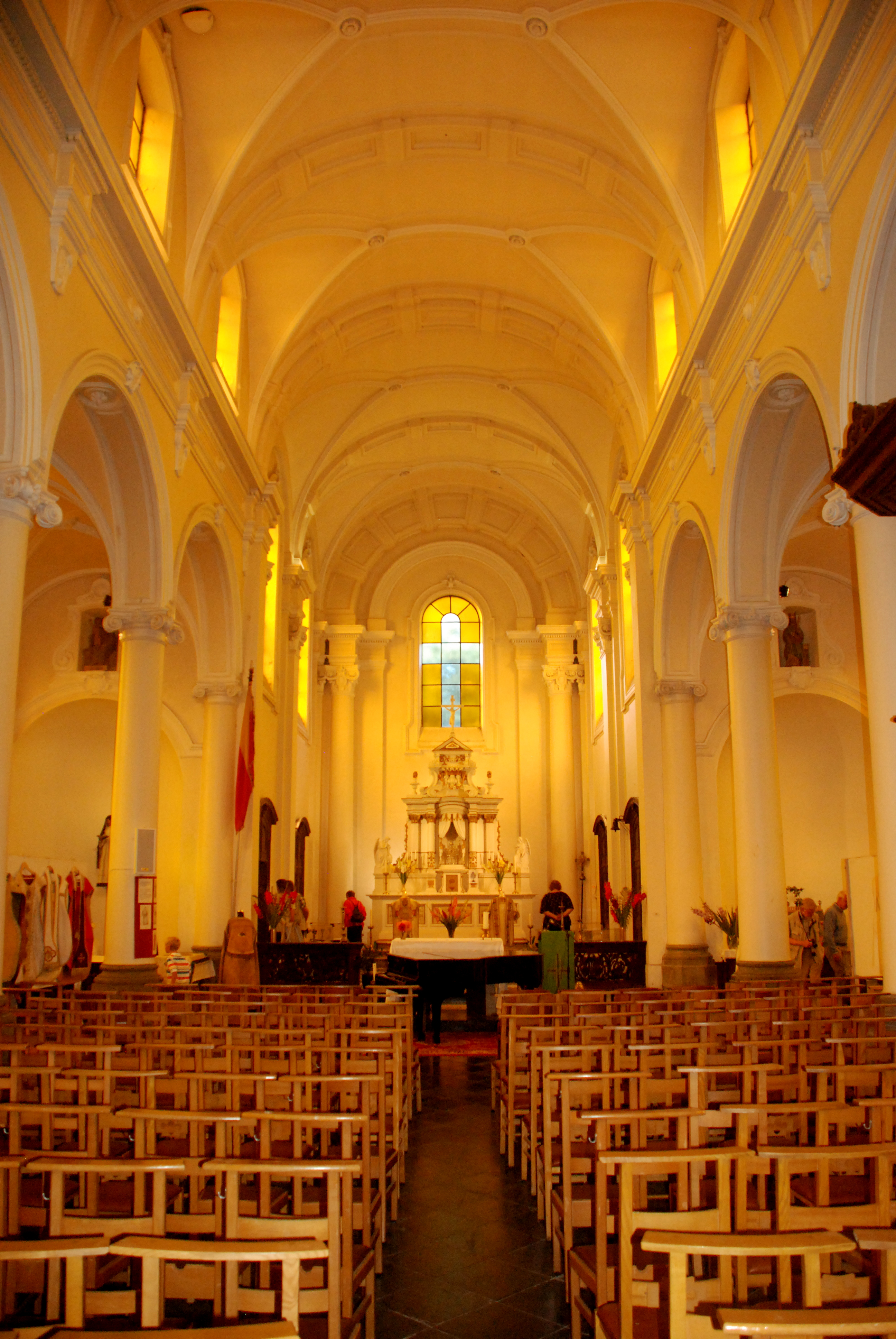 Belgique - Brabant wallon - Chastre - Église Sainte-Gertrude de Gentinnes